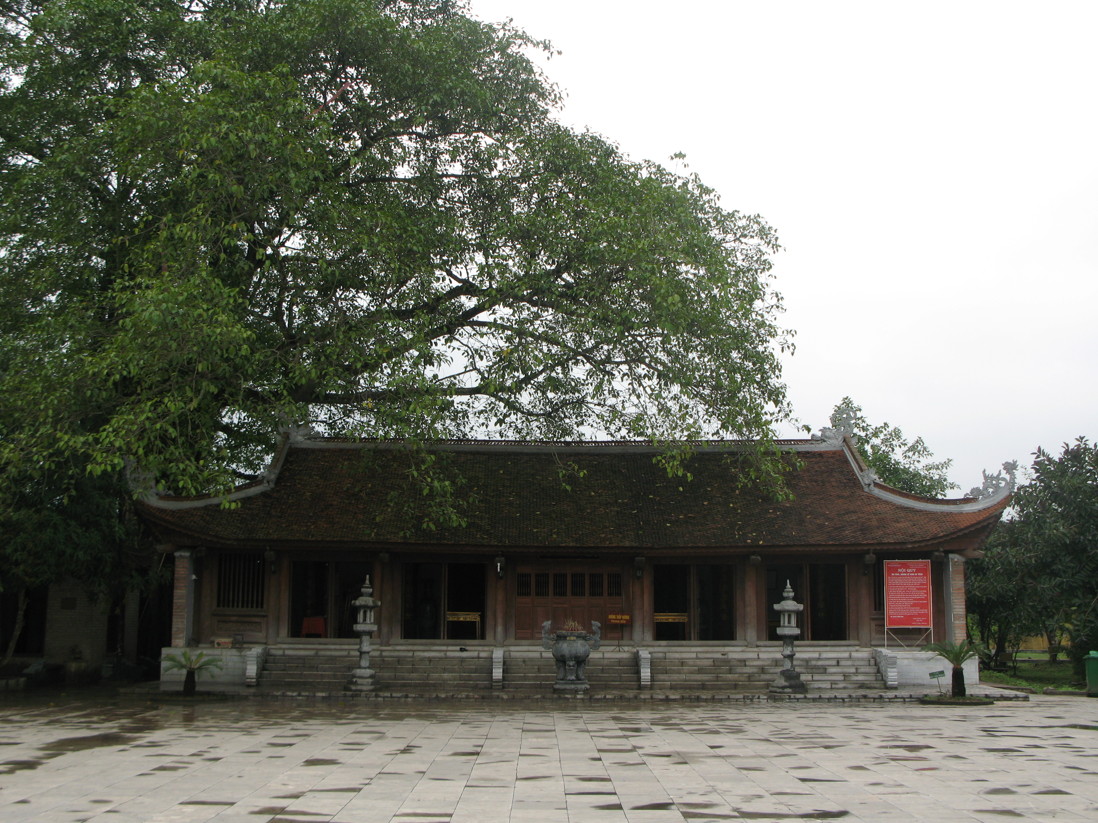 Đền Mẫu Âu Cơ dưới bóng cây đa cổ thụ, huyện Hạ Hòa, Phú Thọ. Ngay dưới gốc đa là Miếu Cô